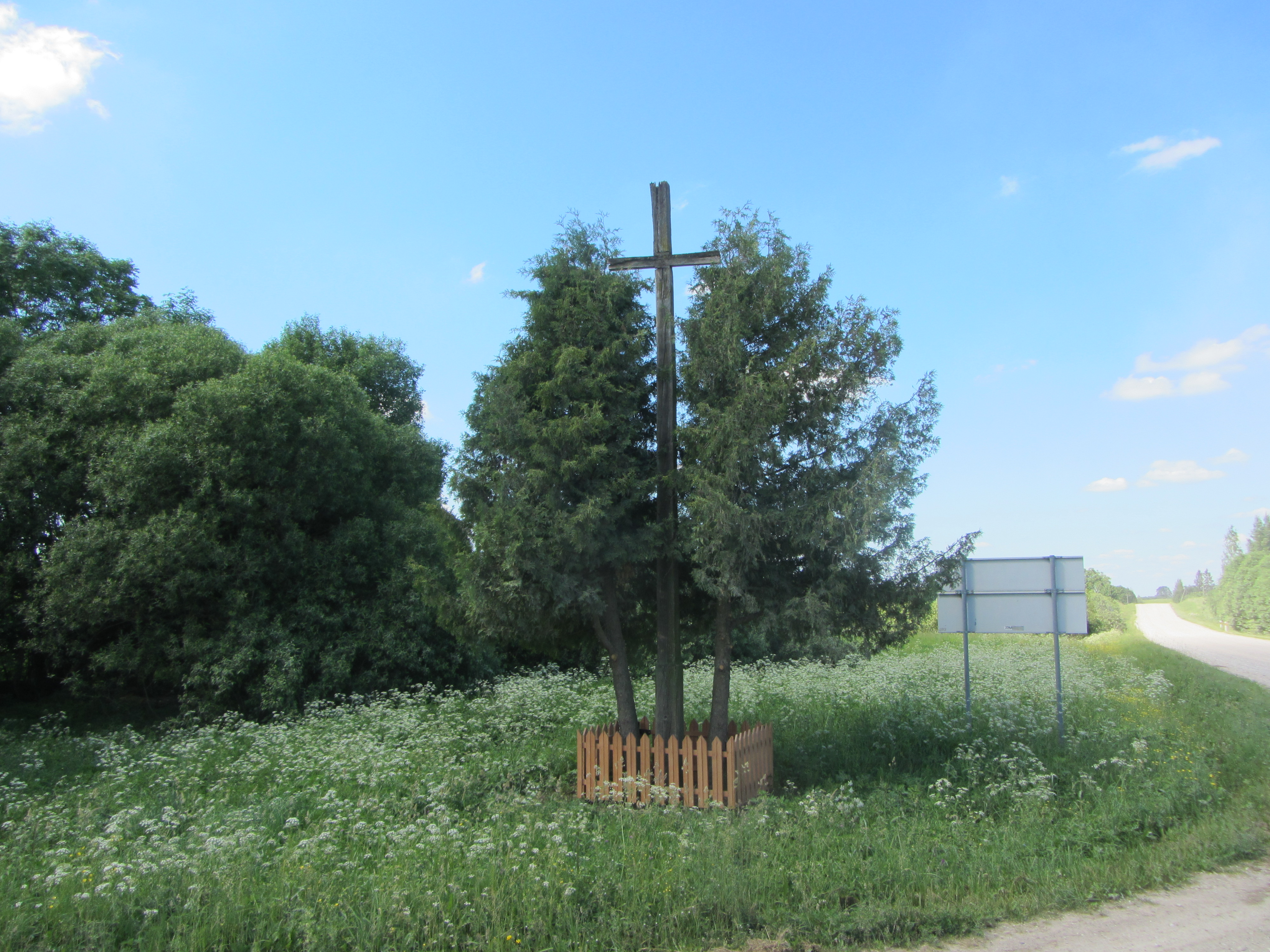 Želvos sen., Lithuania